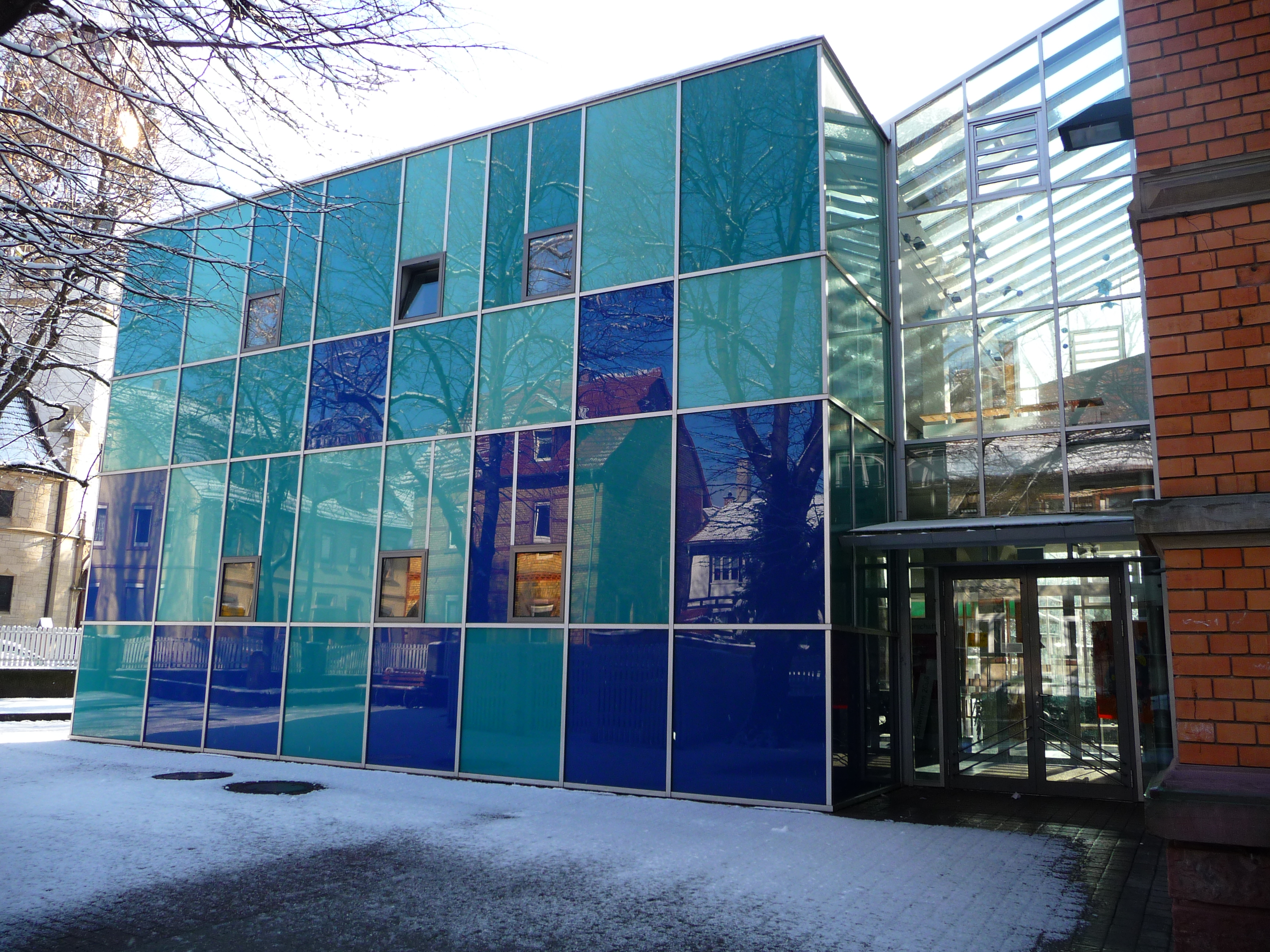 Tiefburgschule (Grundschule) in Heidelberg-Handschuhsheim (Deutschland) - Anbau mit Sporthalle